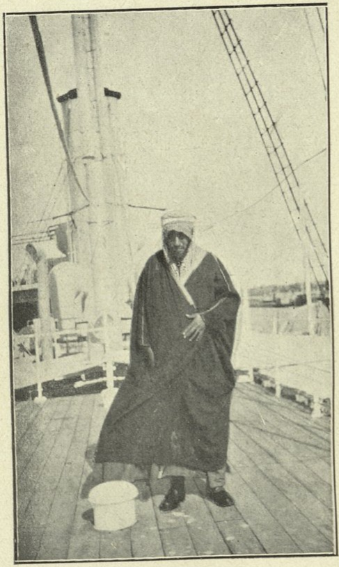 فيصل بن سلطان بن الحميدي بن فيصل بن وطبان الدويش المطيري Faisal El Dwaish